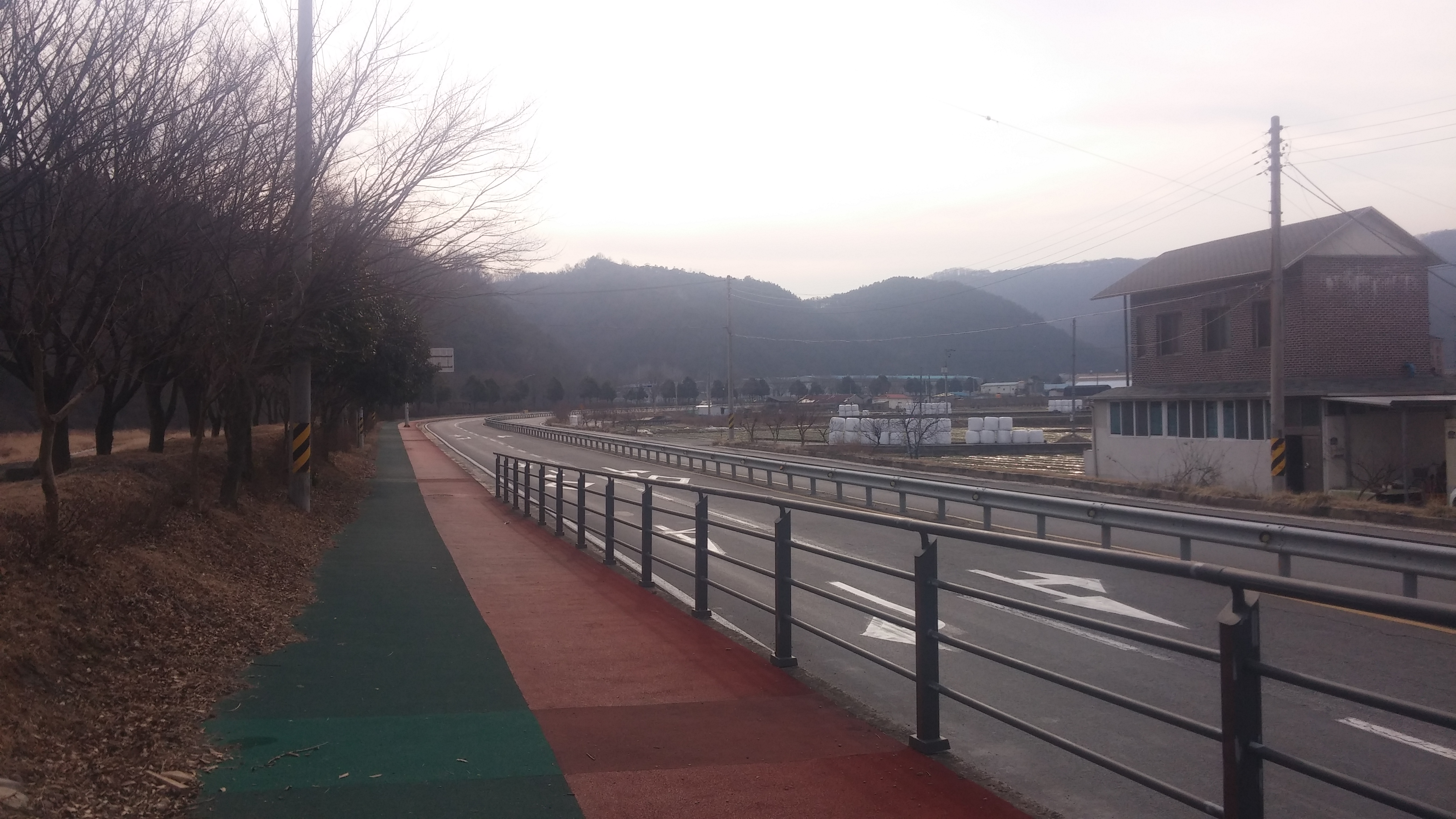 부림로(국가지원지방도 제60호선)